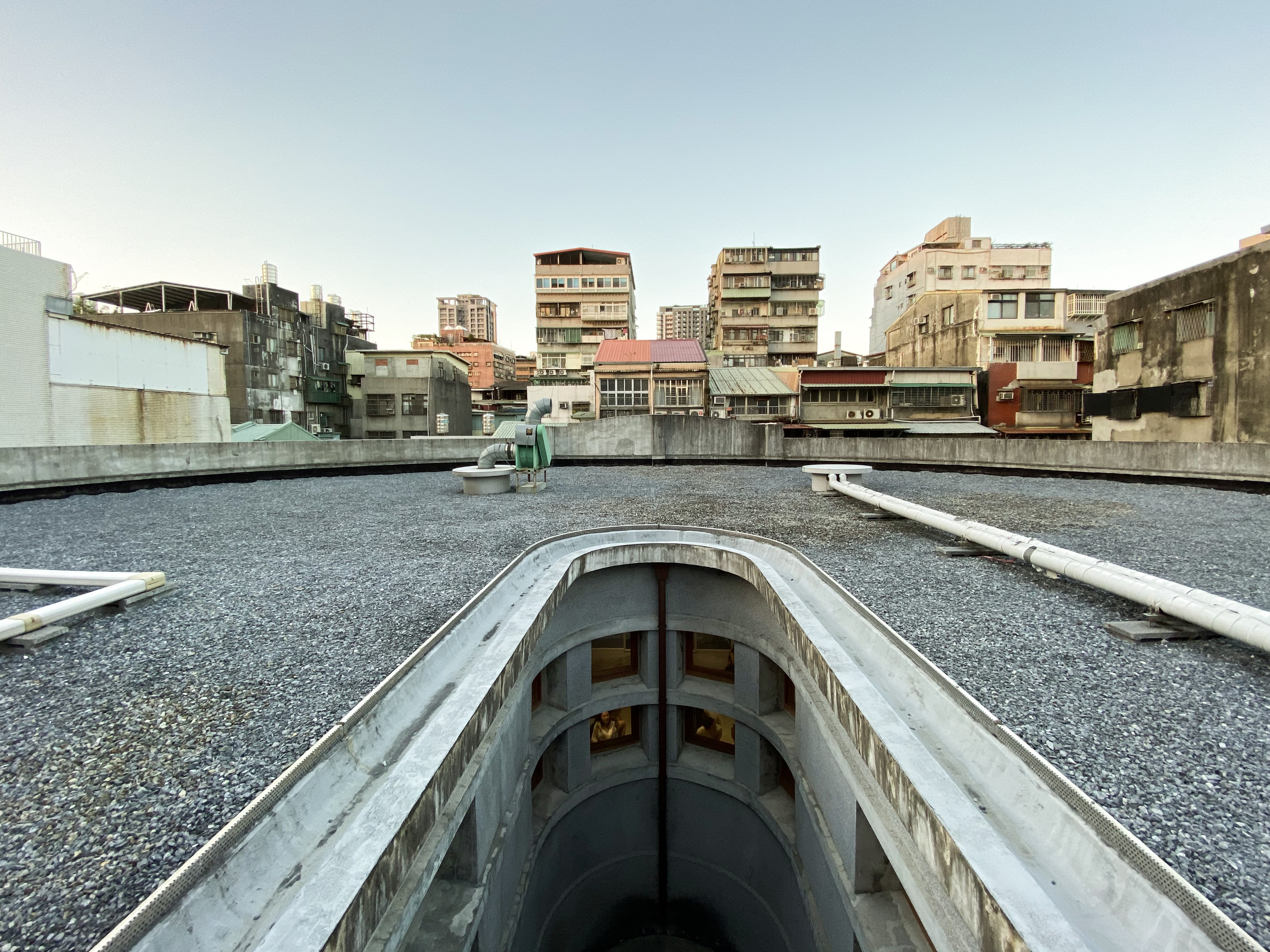 U-mkt roof